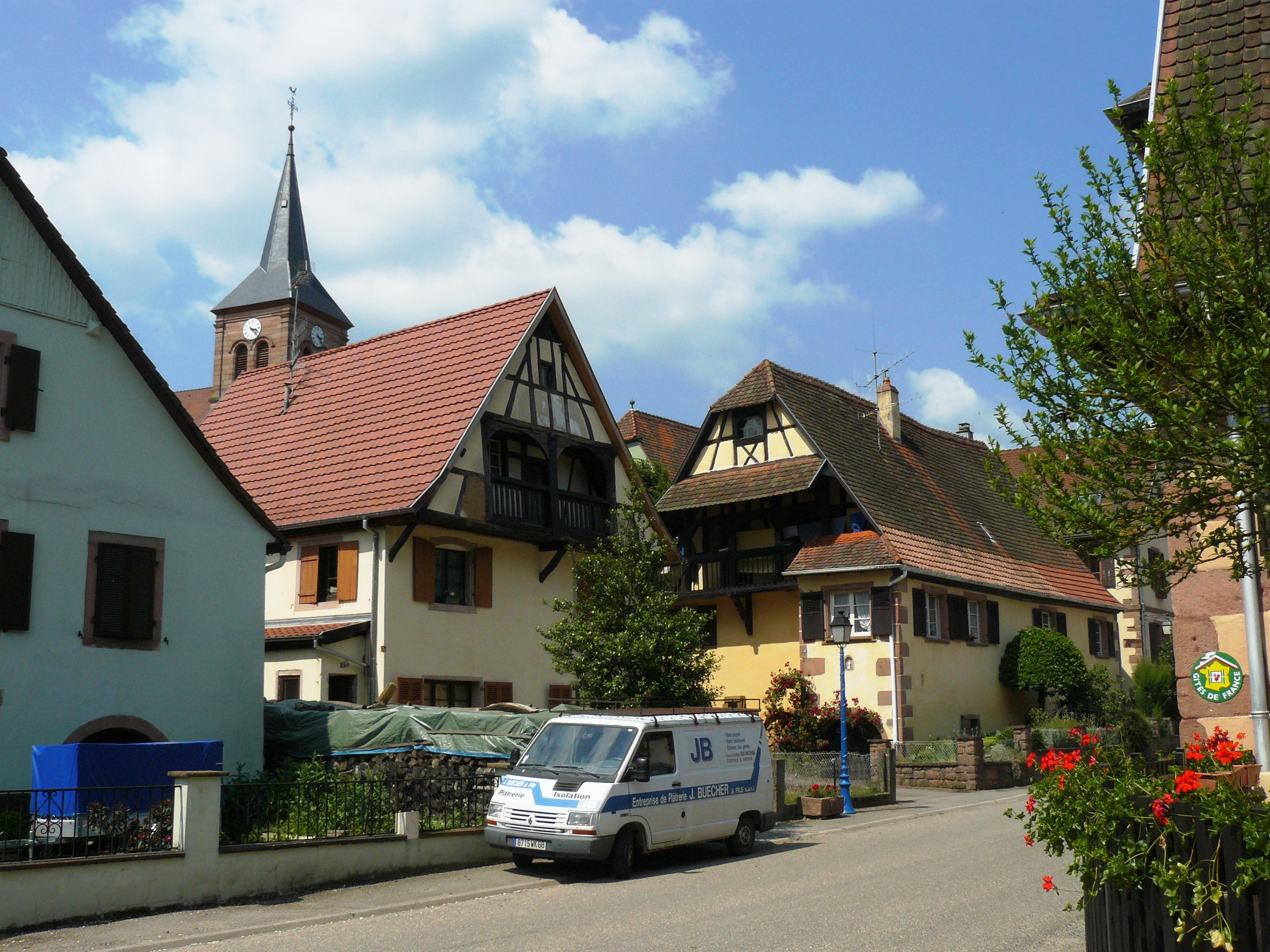 Entrée du village d'Albé par la rue de l'Erlenbach